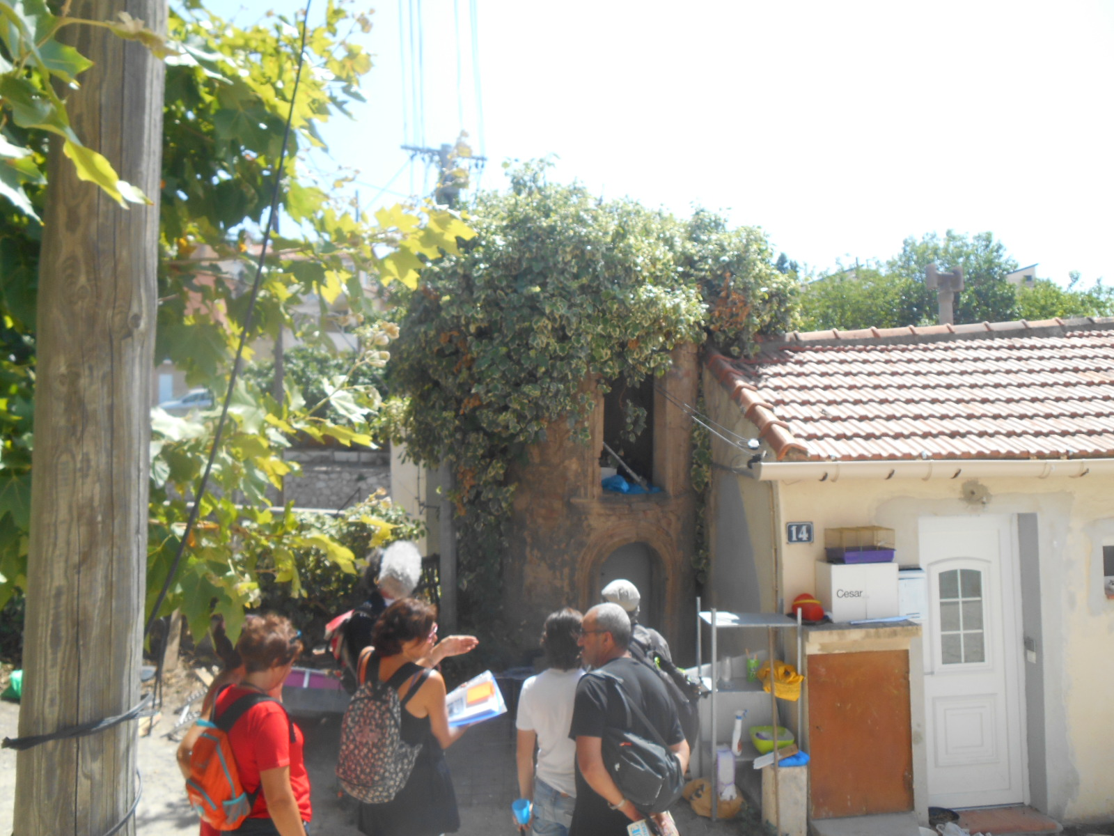 sortie photo pour l'écriture de la page wikipédia Les Riaux par Didac'ressources